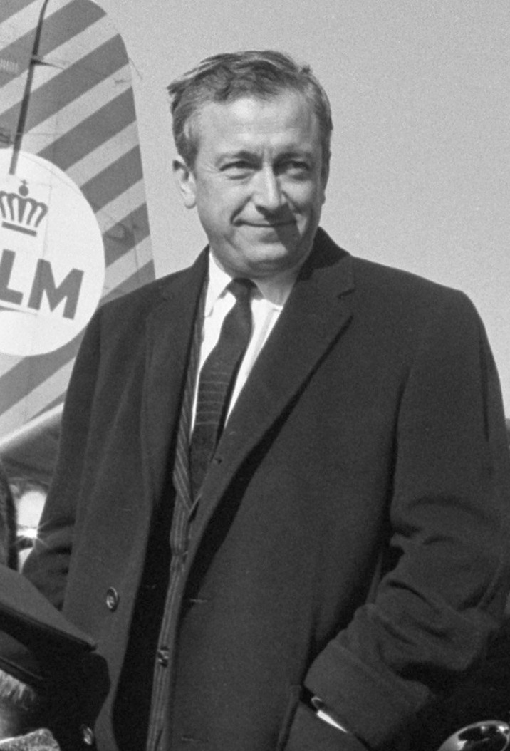 Robert Dhéry en promotion pour le film "La belle américaine" aux Pays-Bas. Libre de droits